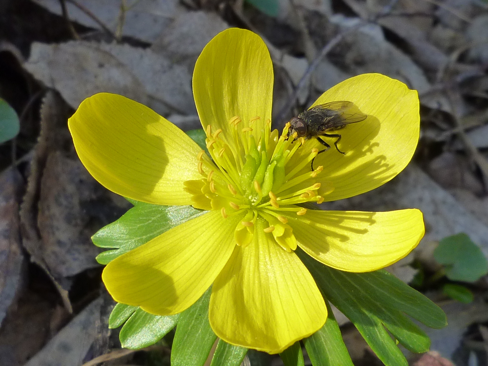 Blüte des Winterling mit Fliege